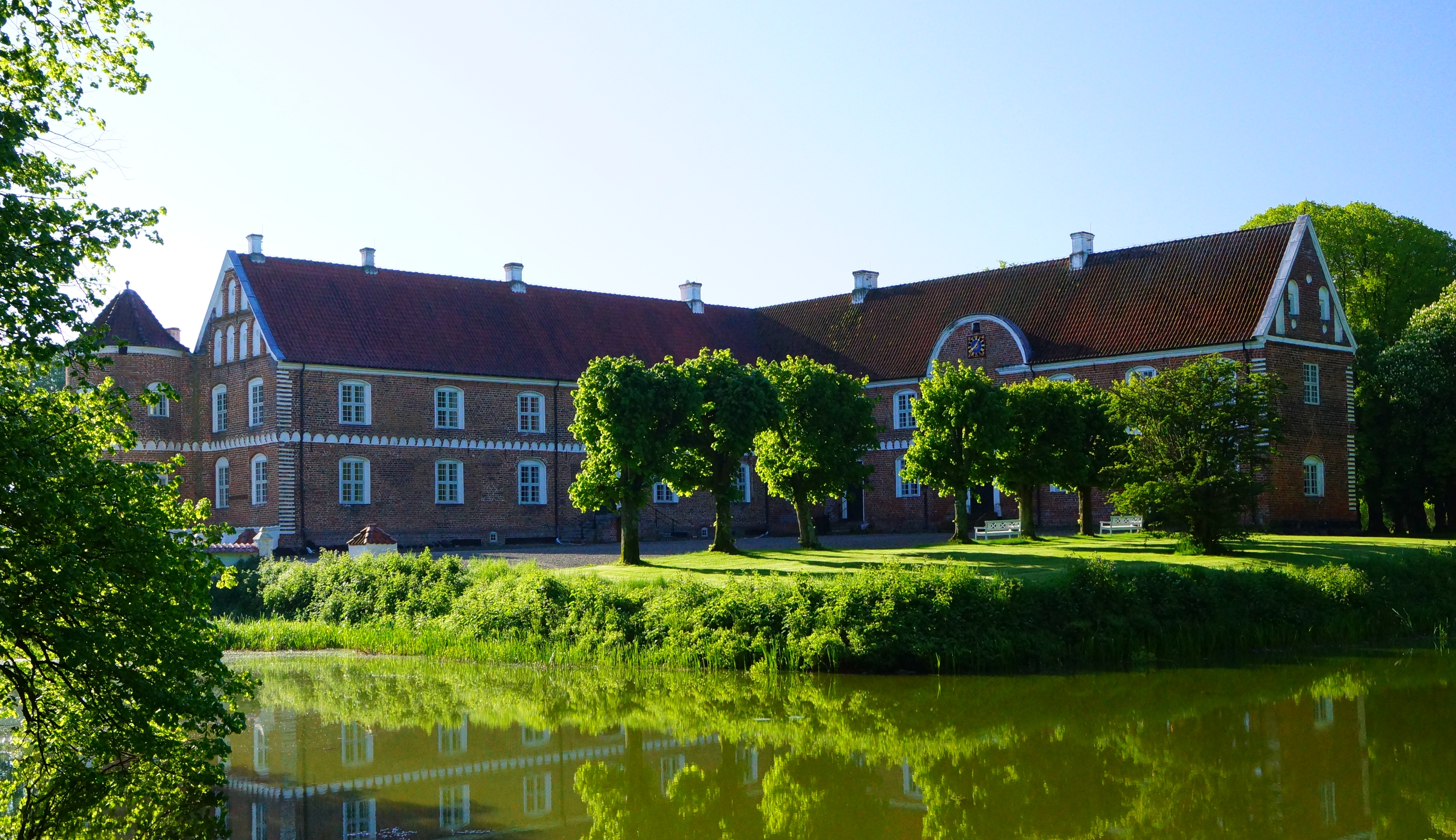 Løvenhom Slot, Djursland, Denmark